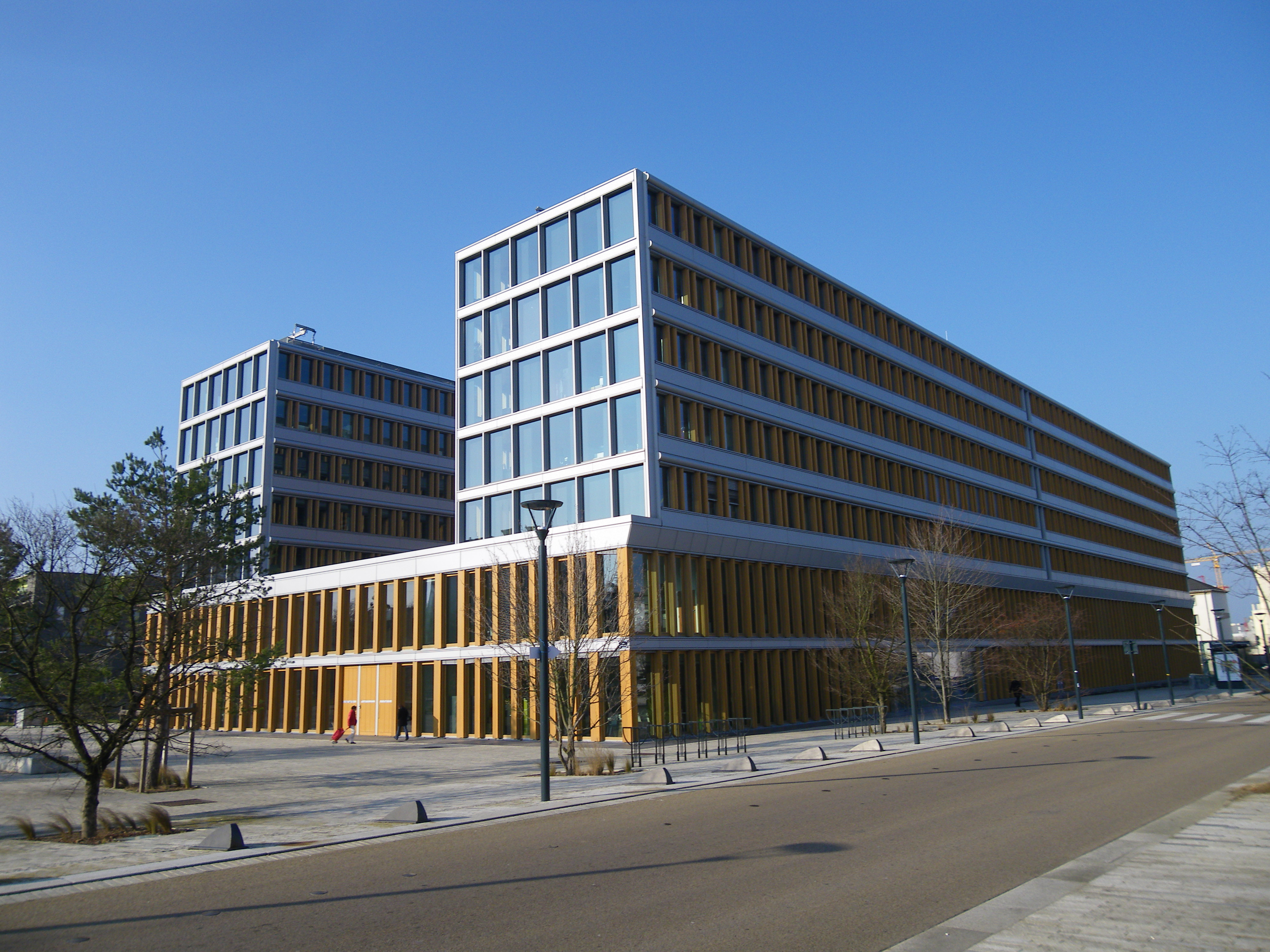 l'immeuble de rennes metropole avenue henri freville a rennes